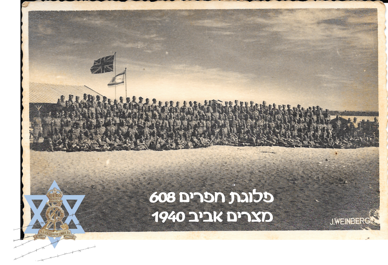 פלוגת החפרים 608 מניפה את דגל ישראל במצריים אביבי 1940